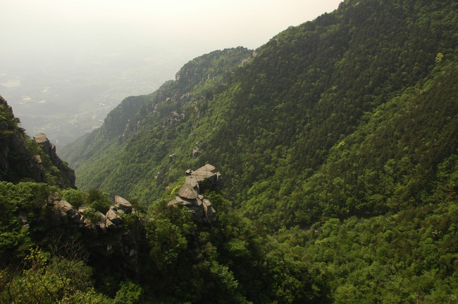 Lu Shan, Jiangxi, China